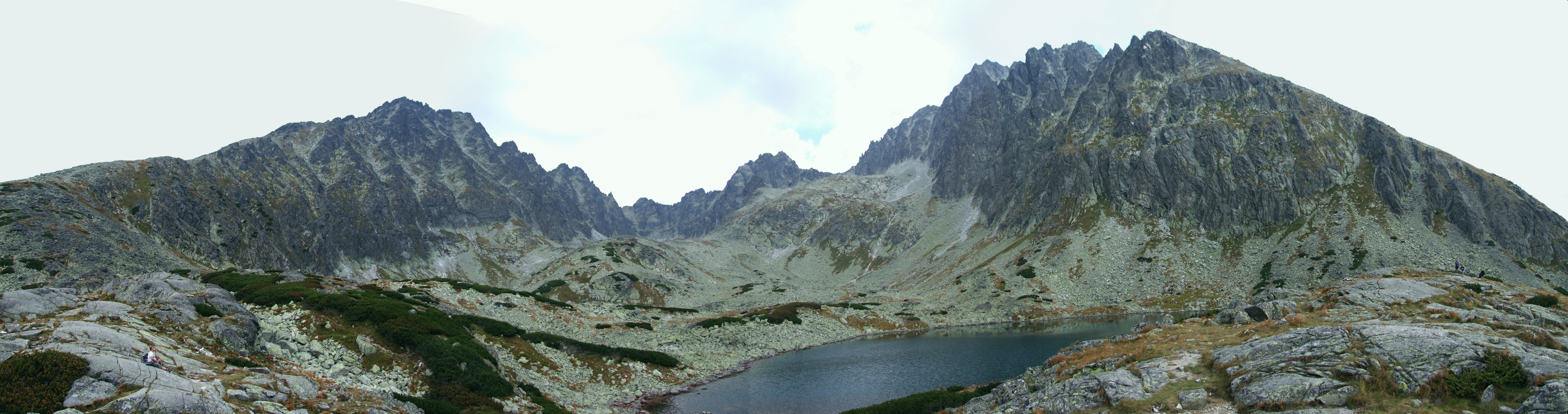 Panorama Doliny Batyżowieckiej